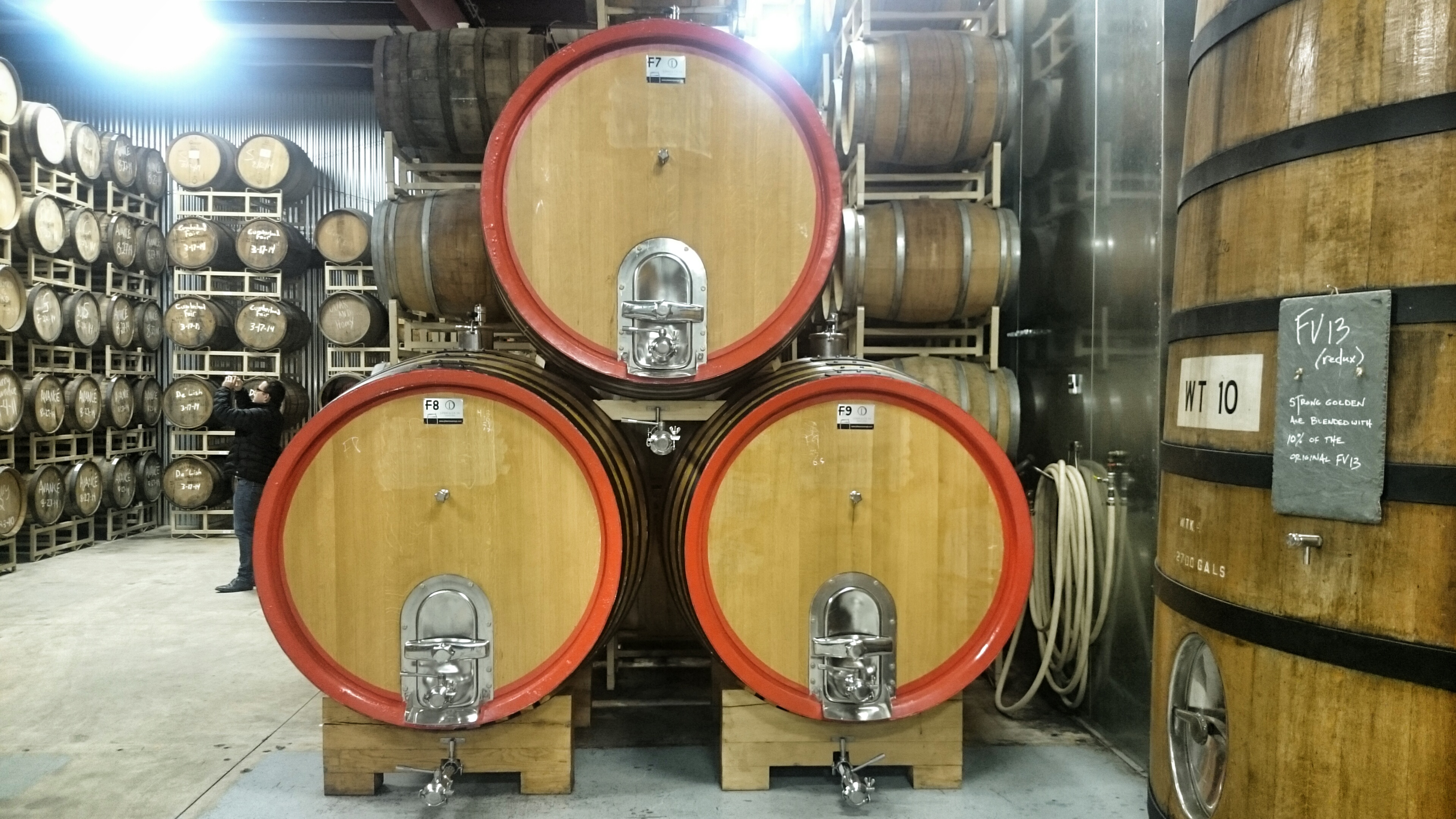 Three Big Beer Barrels